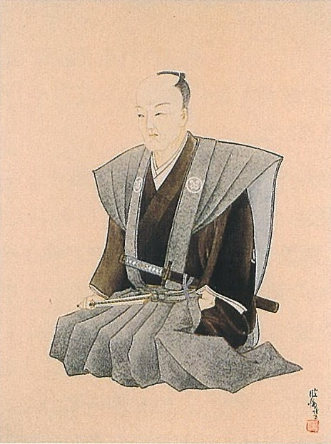 井戸平左衛門正明の肖像。